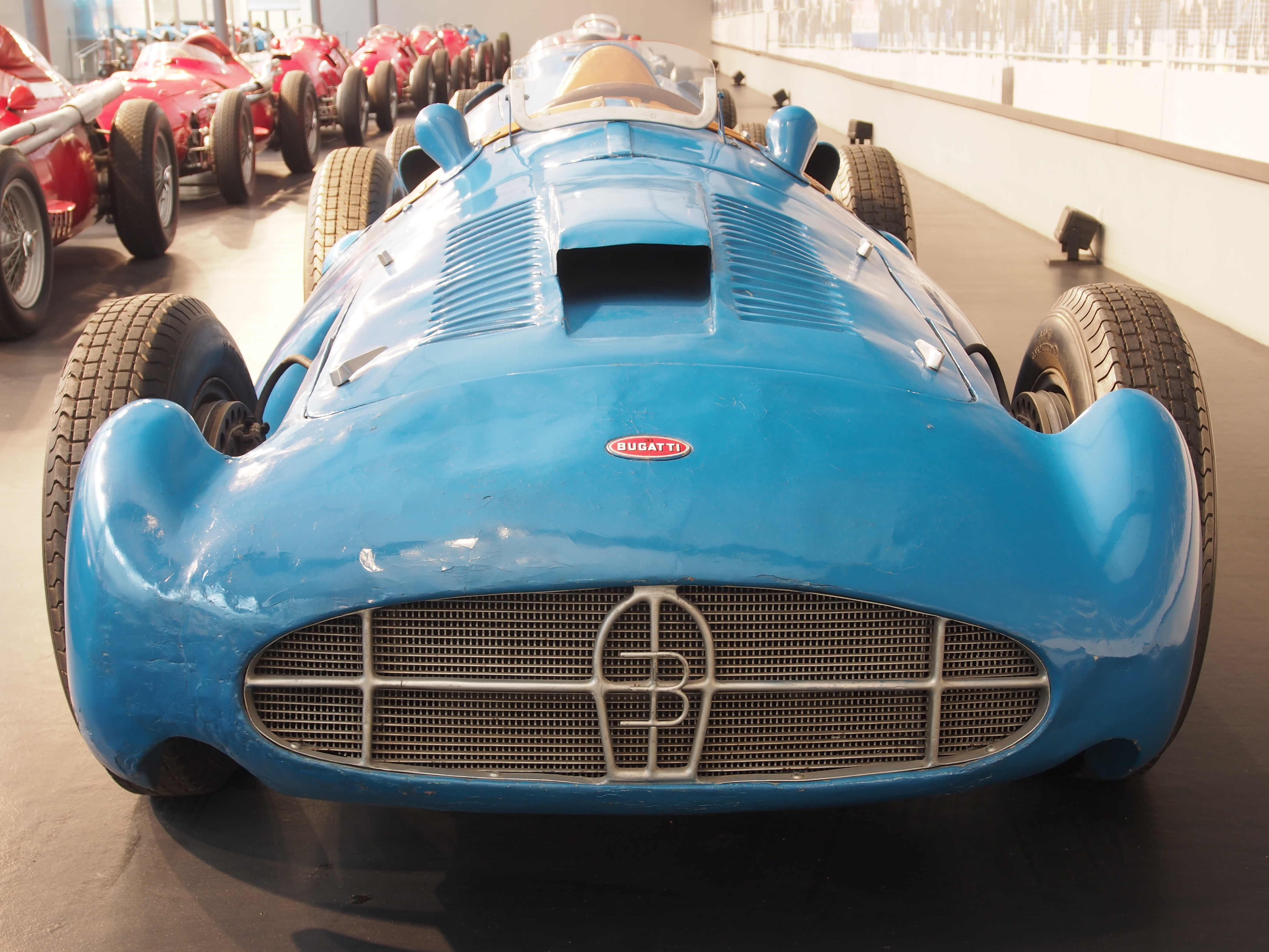 Photographed at the Cité de l’Automobile, Musée national de l’automobile, Collection Schlumpf, Mulhouse, France.